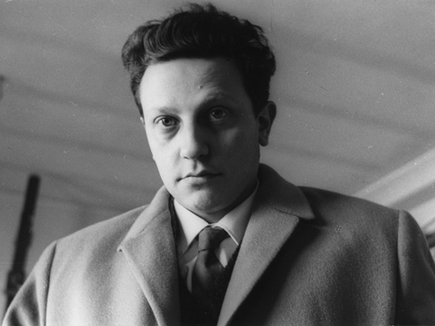 Enrico Crispolti